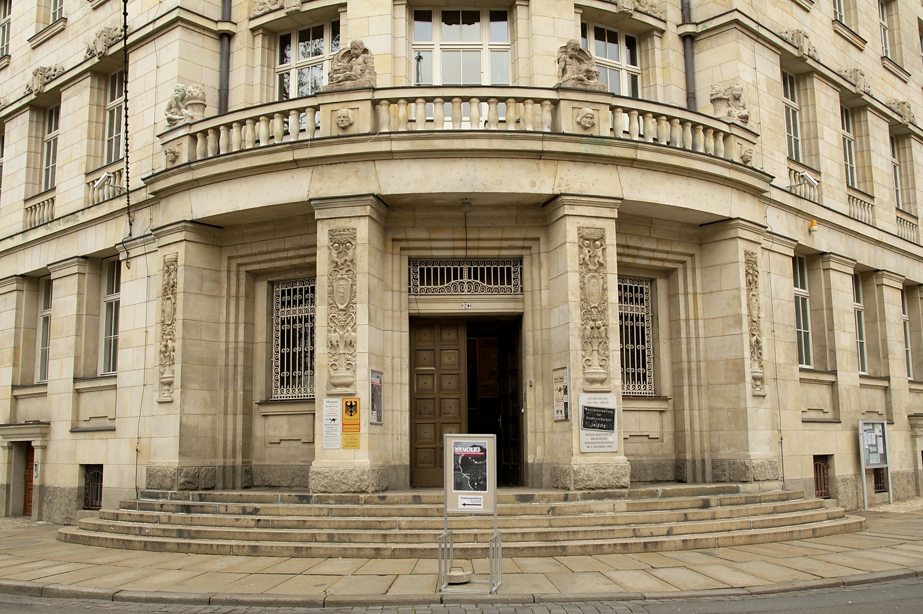 Eingang zur ehemaligen Bezirksverwaltung der Staatsssicherheit Leipzig, heute Gedenkstätte Museum „Runde Ecke“